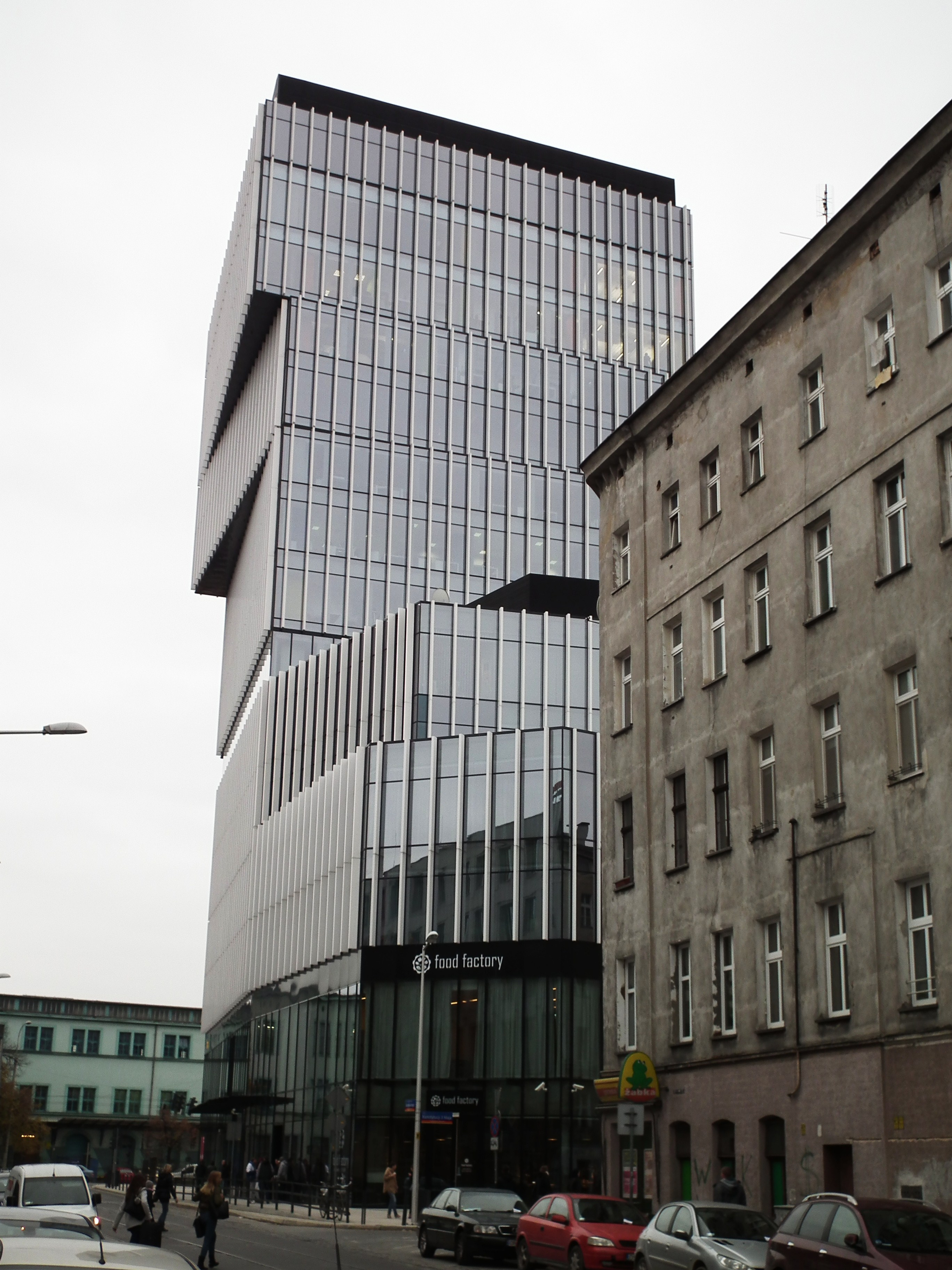 Wrocław. Silver Tower od str. ul. Dąbrowskiego.